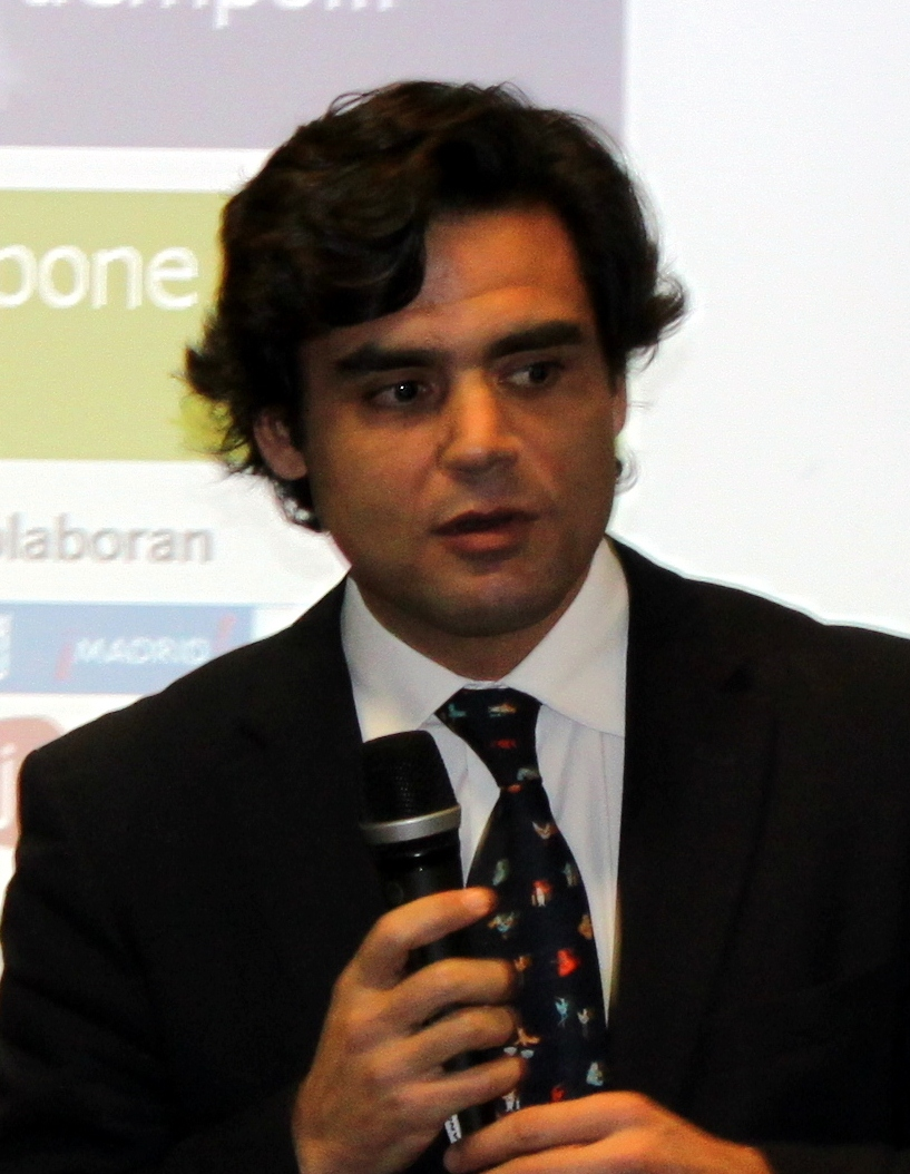 Juan Jose Güemes, Presidente del Centro Internacional de Gestión Emprendedora de IE Business School, da la bienvenida a los asistentes a la final del VI Campus de Emprendedores